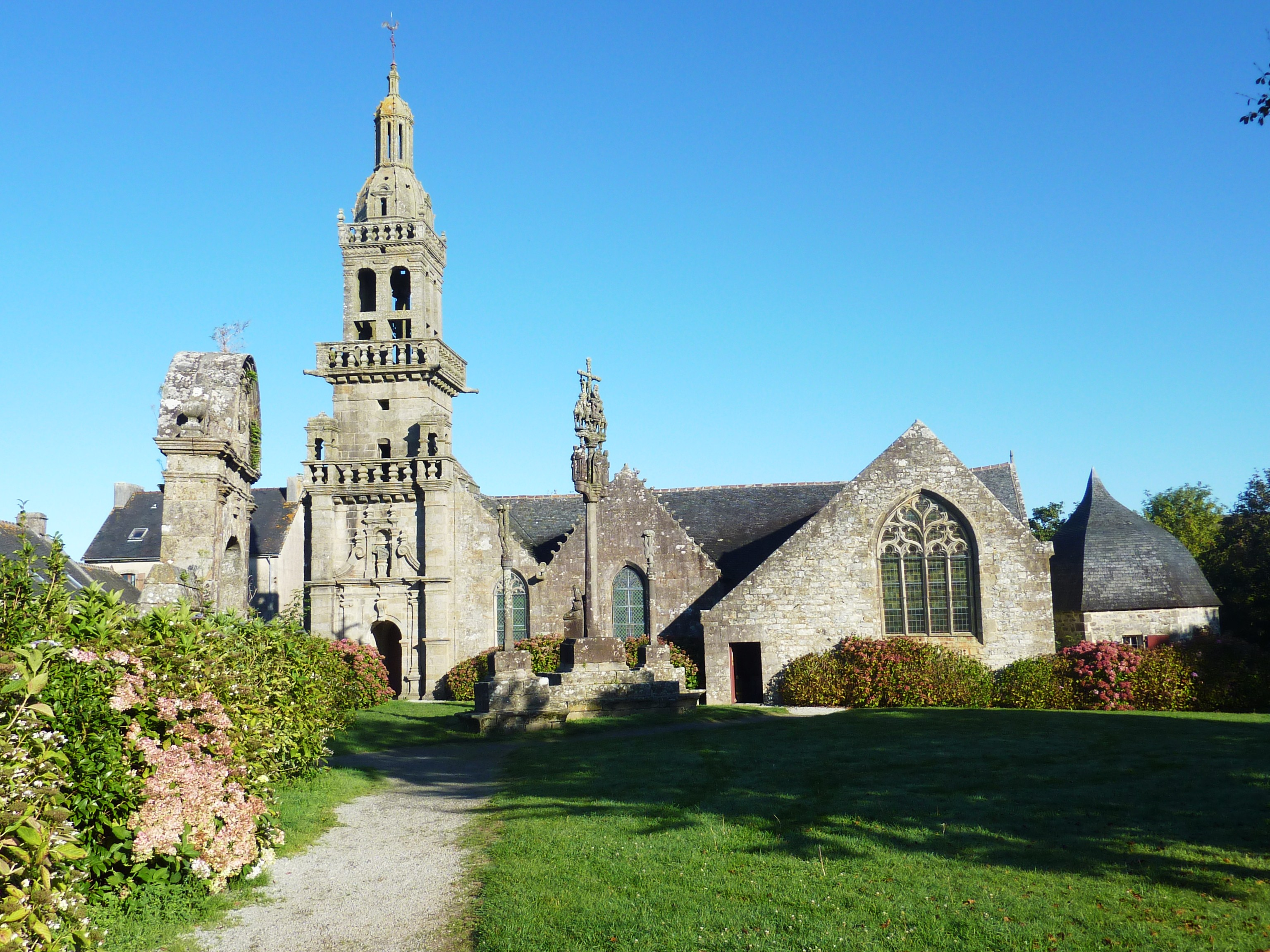 La chapelle de Sainte-Marie-du-Ménez-Hom: vue d'ensemble depuis le placître